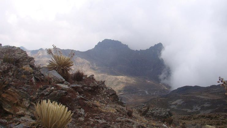 Sierra de la Culata, Sector Alto de timotes